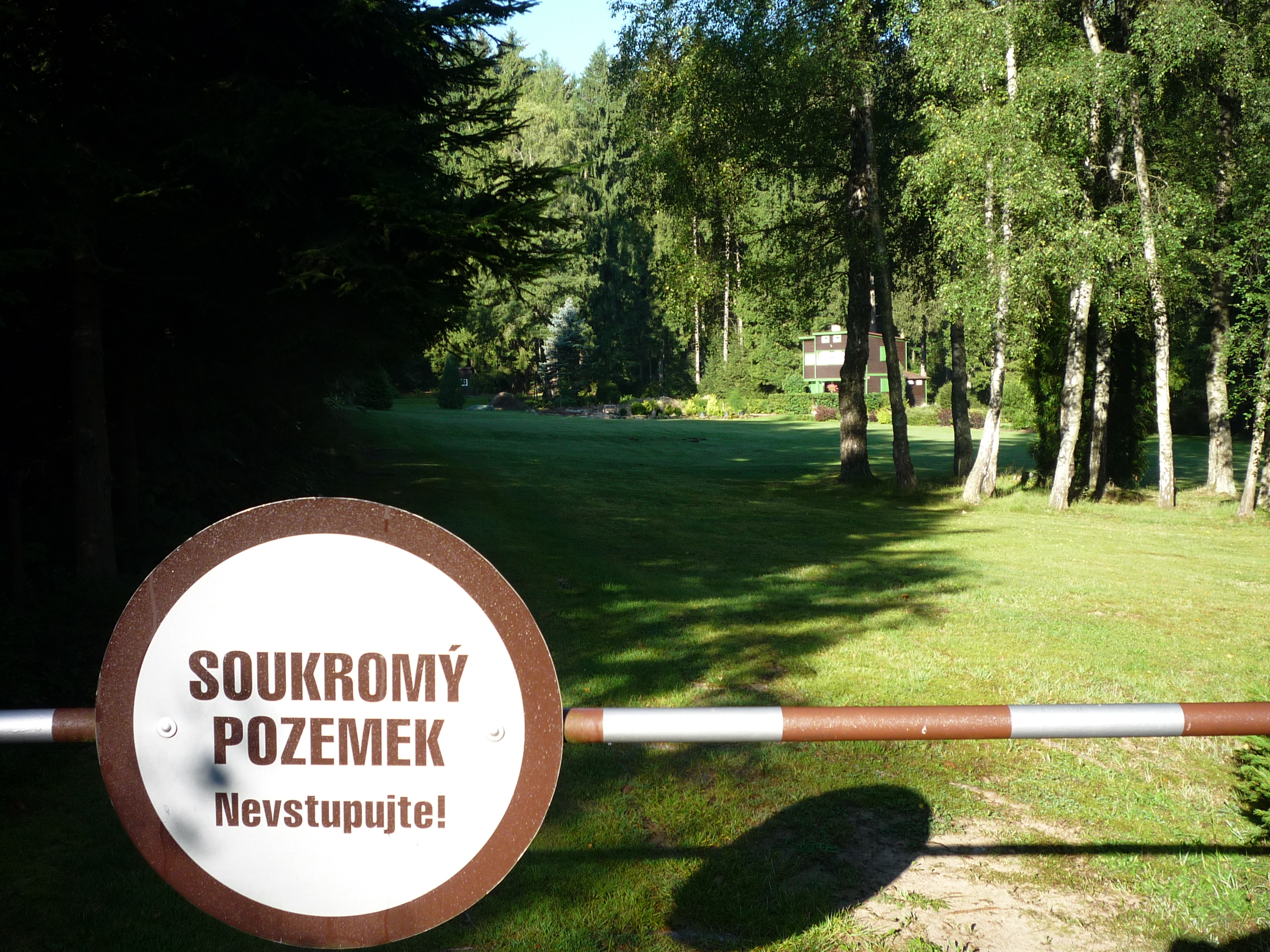 Autor fotografie Jiří Zelenka. Toulky Vysočinou.Pilská nádrž. Žďár nad Sázavou. Czech Republic.